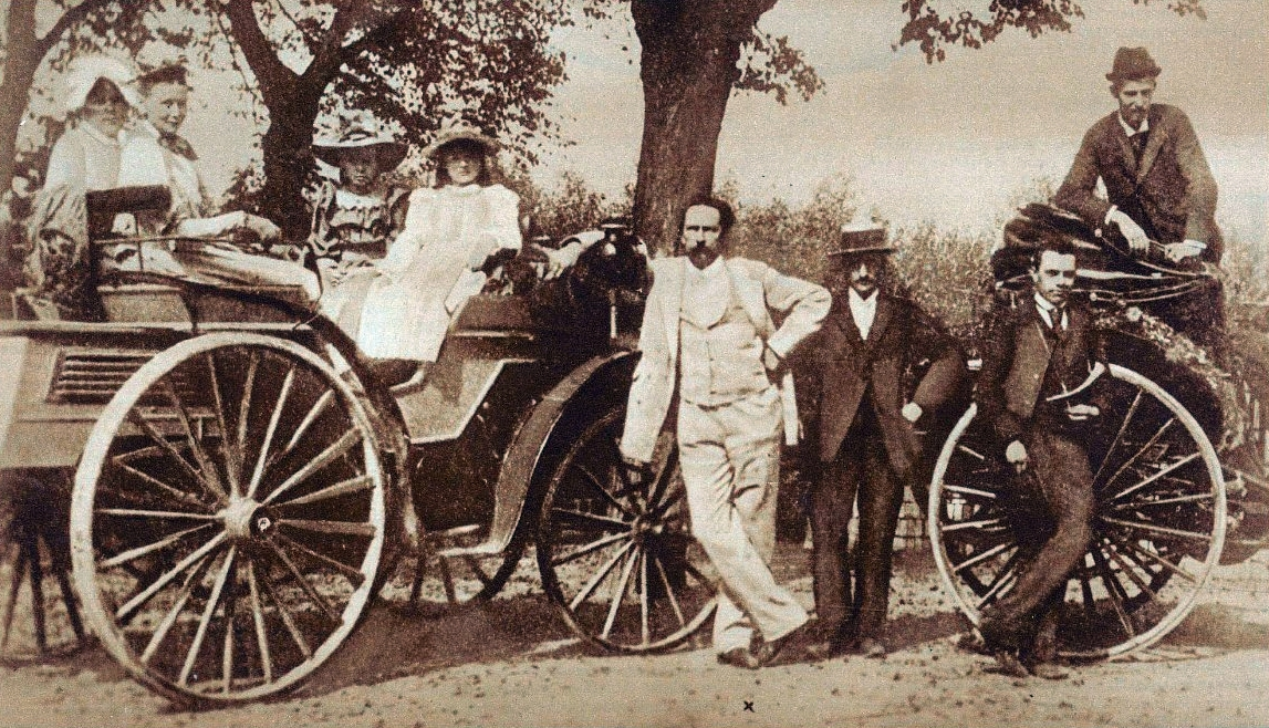 Karl Benz (1844–1929) mit seiner Familie